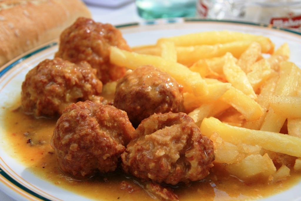 Albóndigas de ternera, con guarnición de patatas.